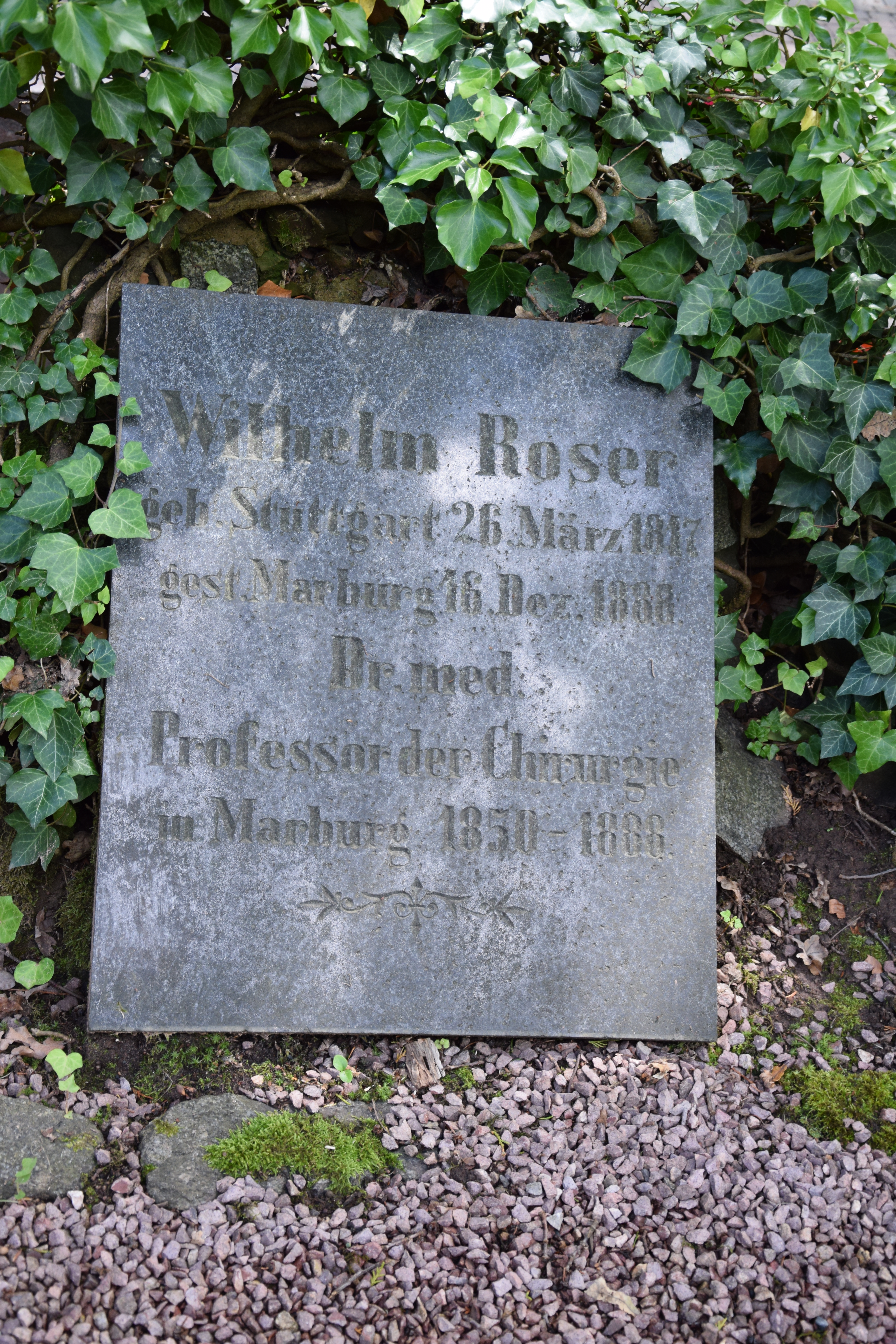 Grab von Wilhelm Roser auf dem Marburger Hauptfriedhof (2017)